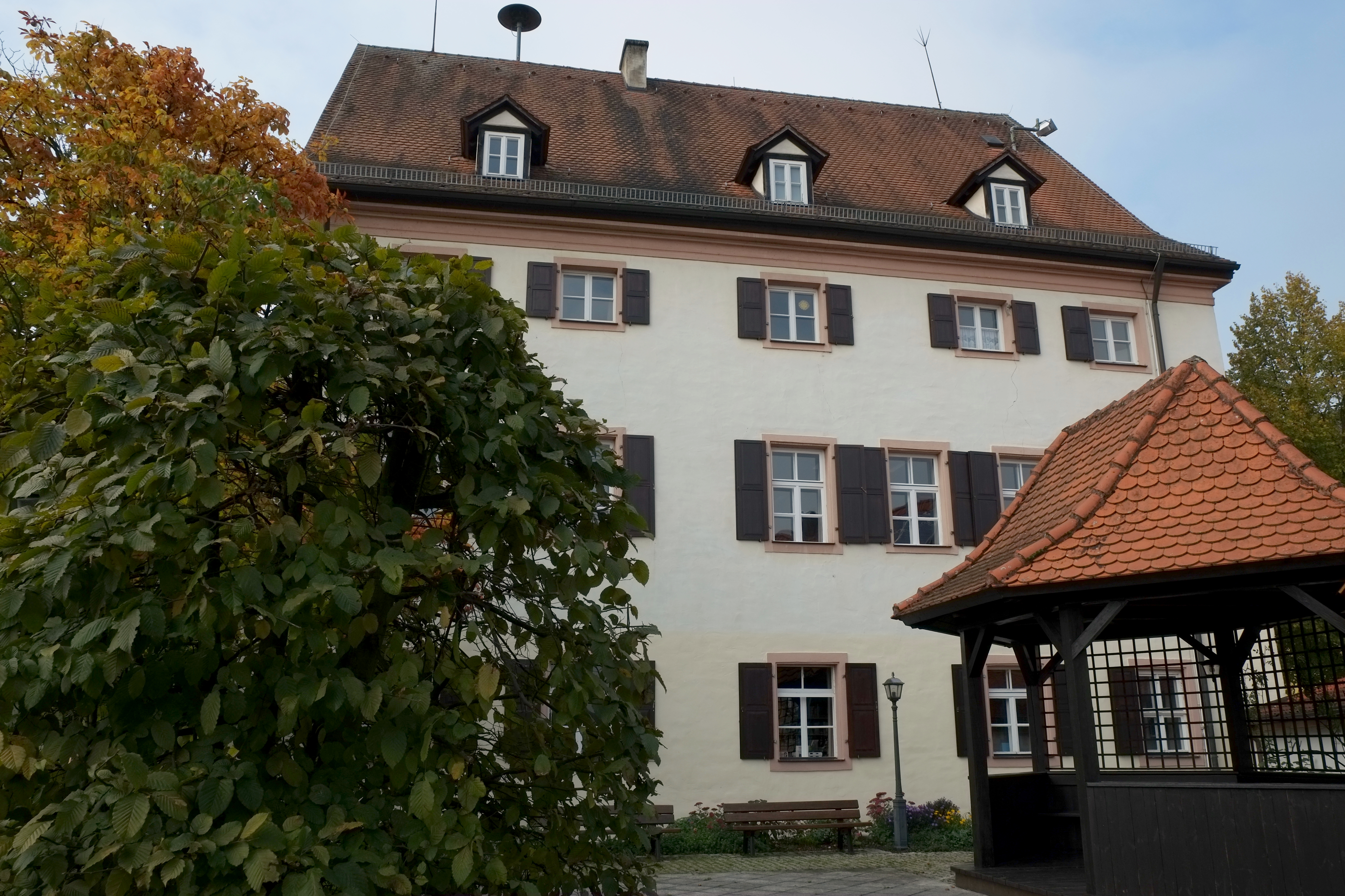 Schloss in Pleinfeld im Landkreis Weißenburg-Gunzenhausen (Bayern/Deutschland)